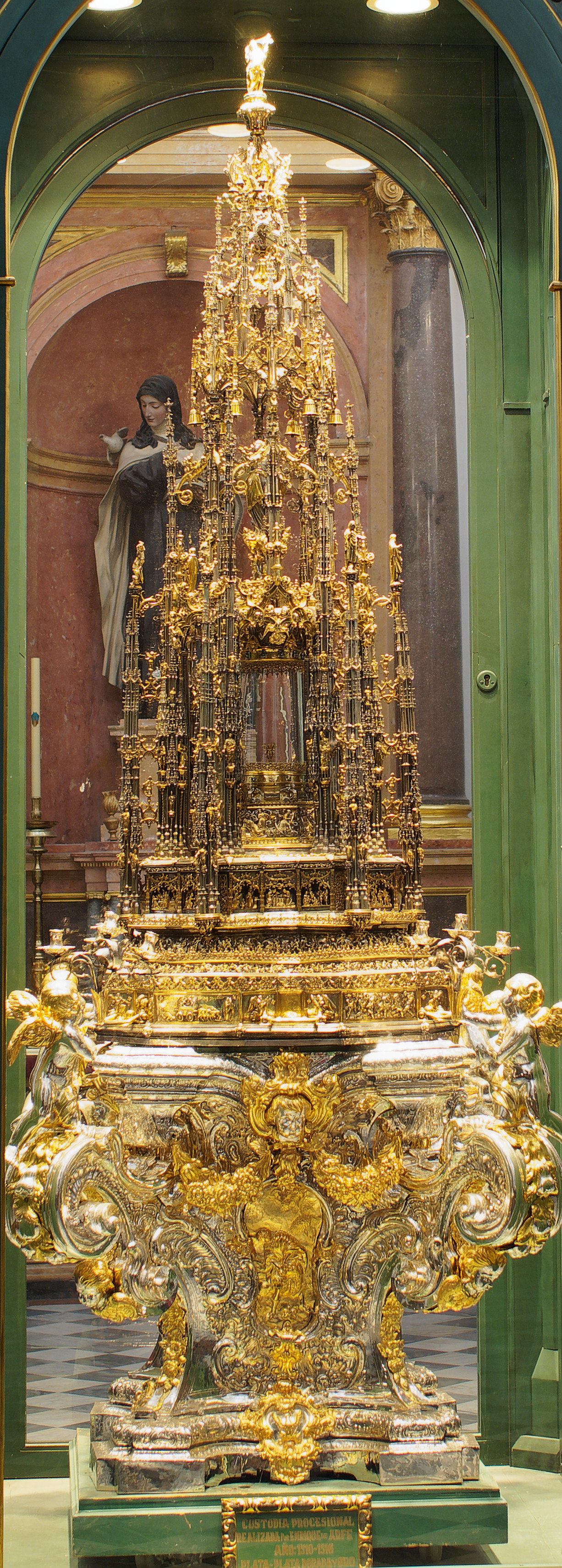 Innenansicht der Mezquita Catedral de Córdoba, Andalusien, Spanien. Monstranz in der Theresakapelle und Schatzkammer.